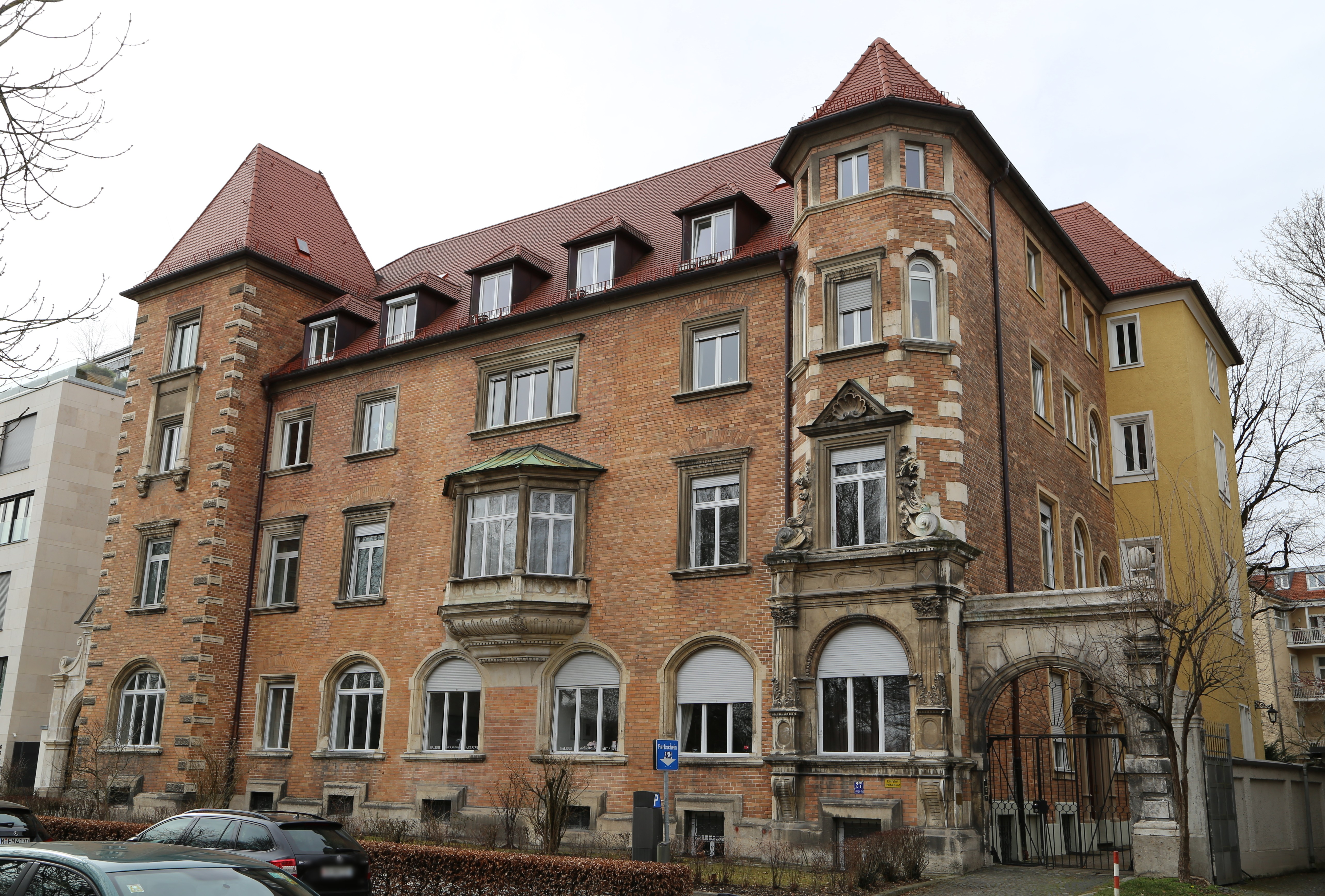 Königinstraße 27, München; Defregger-Haus, deutsche Renaissance, malerischer Rohbacksteinbau mit reichen Kalksteingliederungen, 1893/94 von Georg von Hauberrisser.